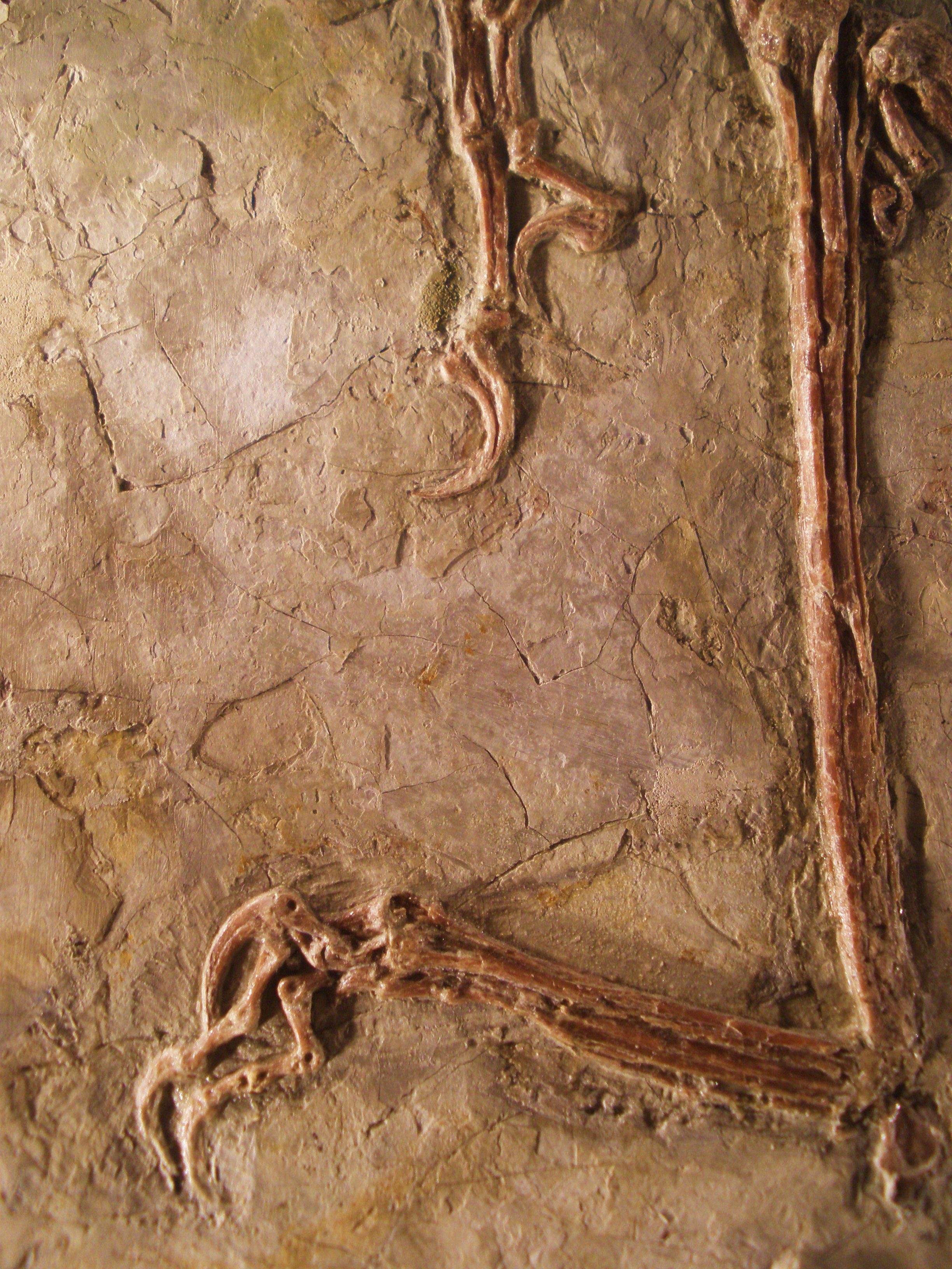 fossil Microraptor